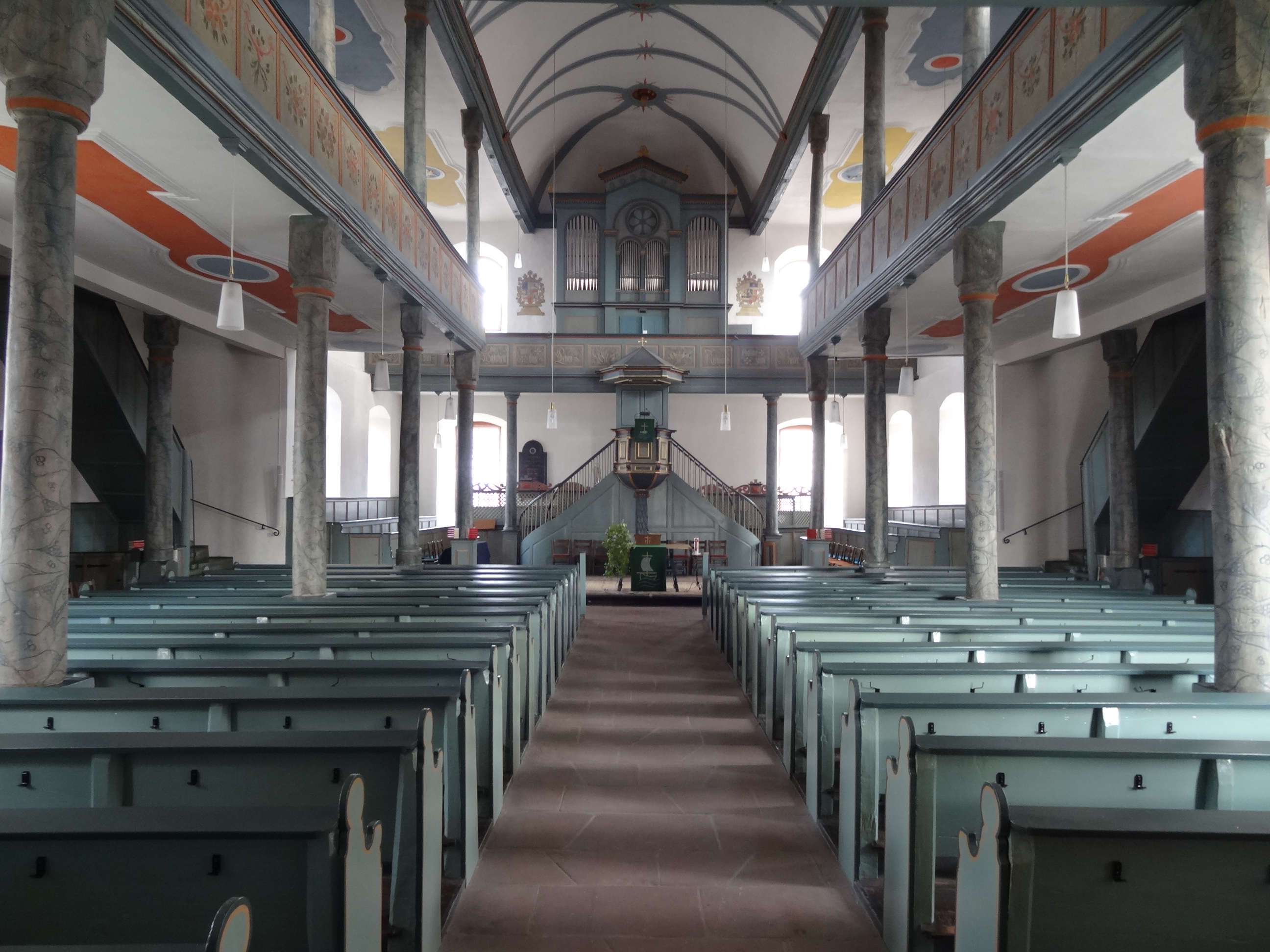 Evangelische Pfarrkirche (Gambach)